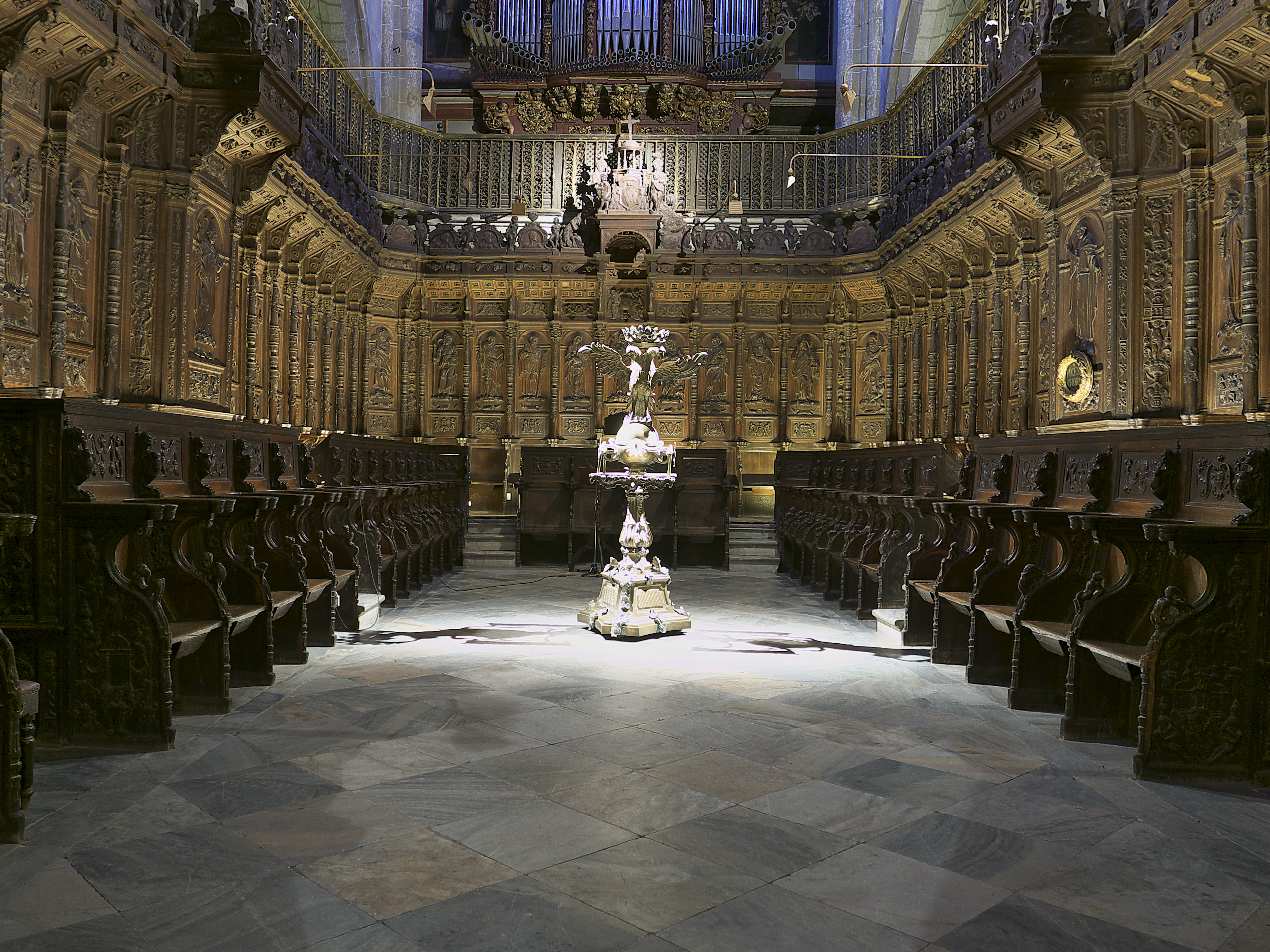 Sillería contratada con Jerónimo de Valencia y Hans de Bruselas (1555)